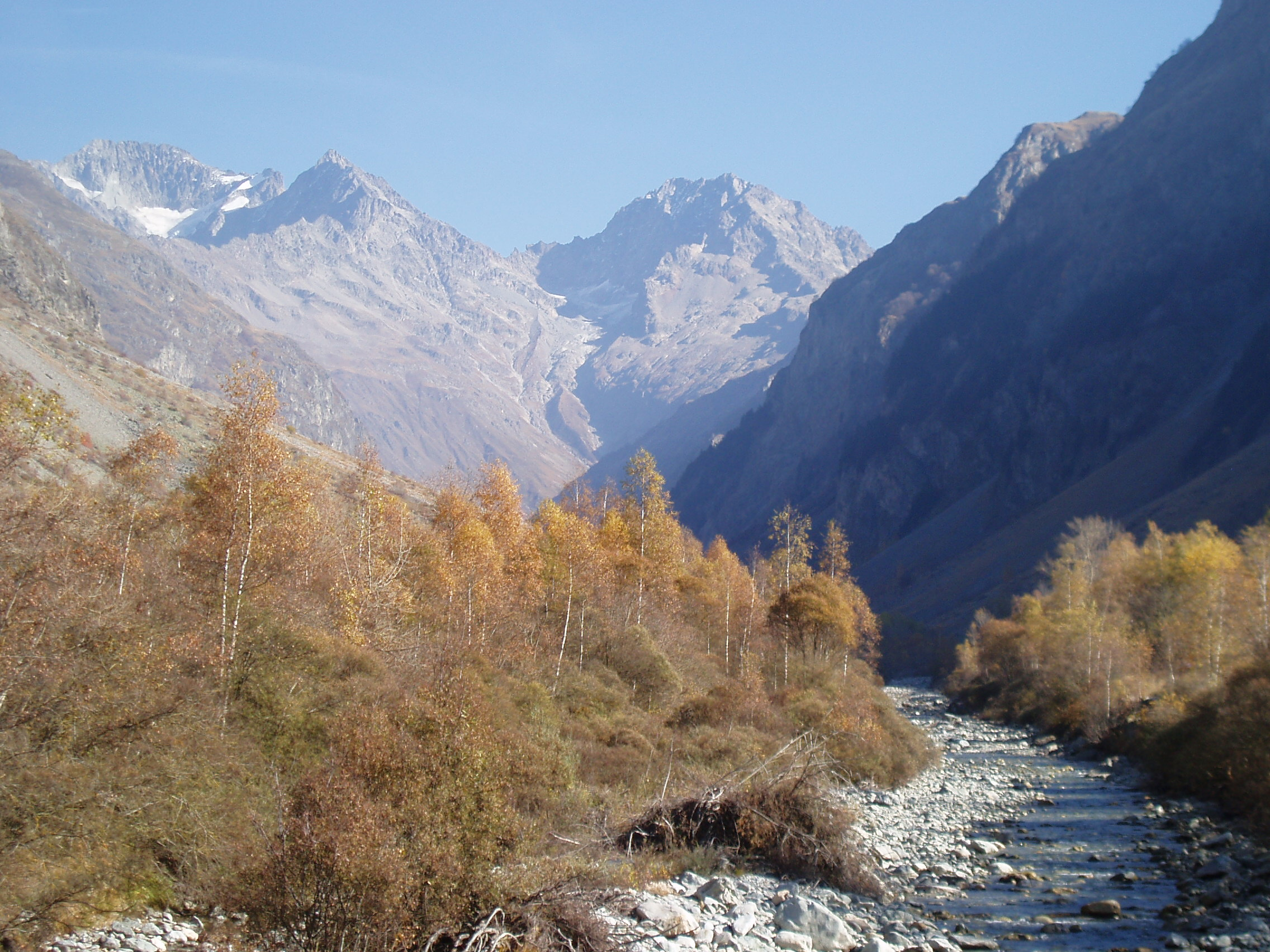 la vallée du Valgaudemar,dans les écrins. La Chapelle est sur la droite, l'Olan à gauche.